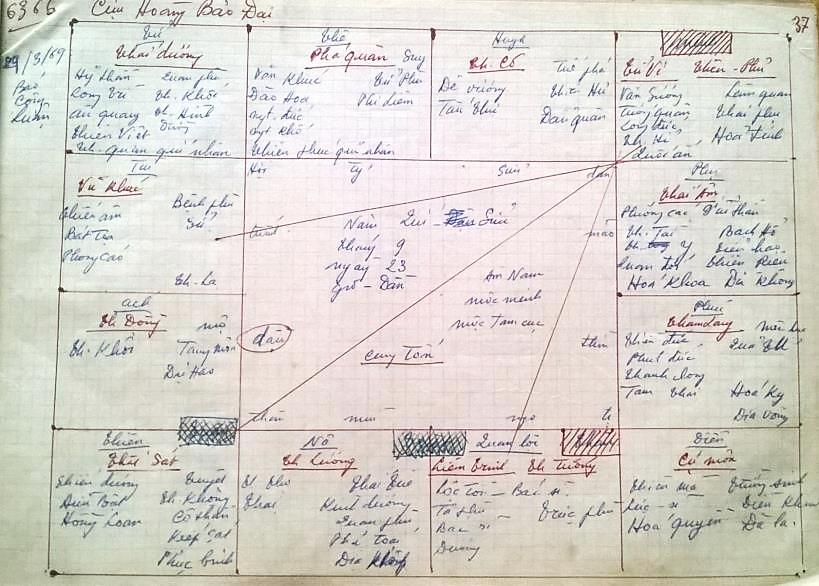 bảo Đại 2